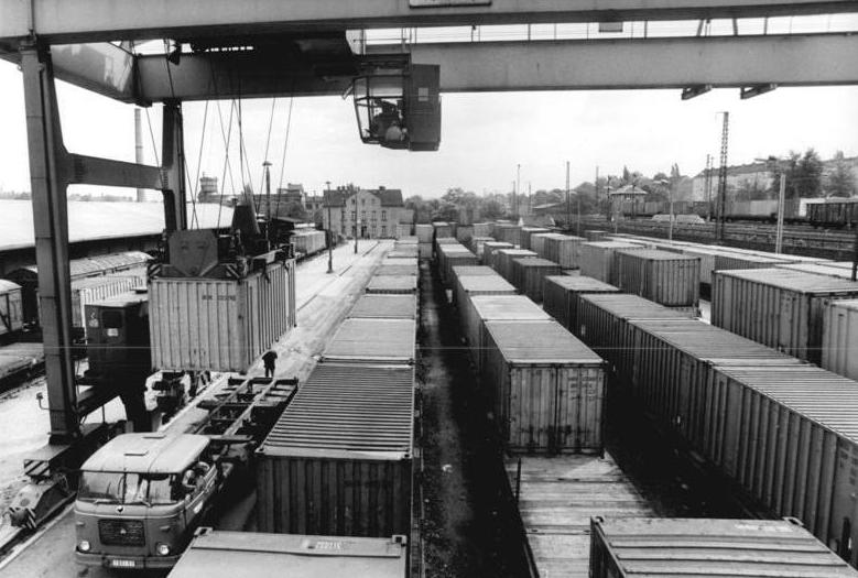 Chemnitz, Großcontainerbahnhof, Güterbahnhof ADN-ZB Thieme 7-6-82 Wettbewerb-Karl-Marx-Stadt: Die Umschlagleistungen des Großcontainerbahnhofes Kappel werden in diesem Jahr auf 129 Prozent steigen. Diese hohe Zielsetzung wollen die Werkstätigen durch den Zweikranbetrieb rund um die Uhr realisieren.